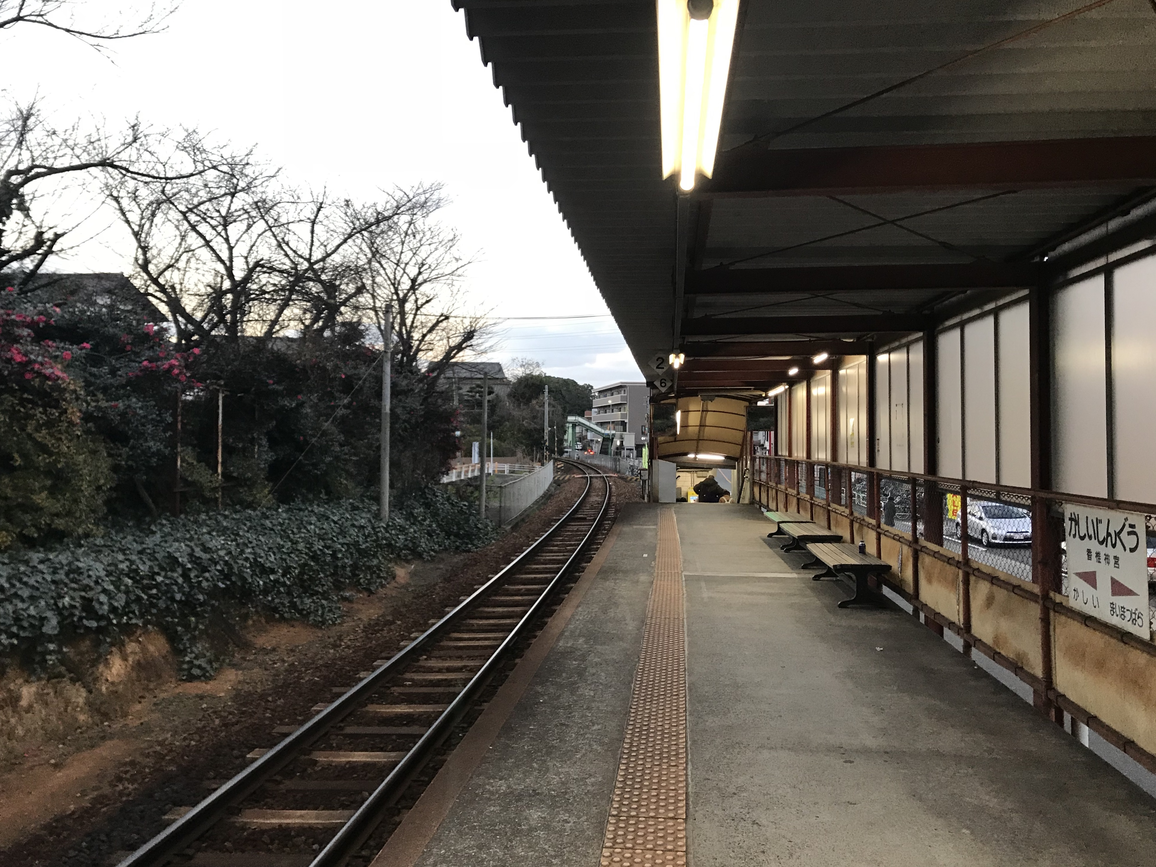 香椎神宮駅のホーム(奥は香椎方面)